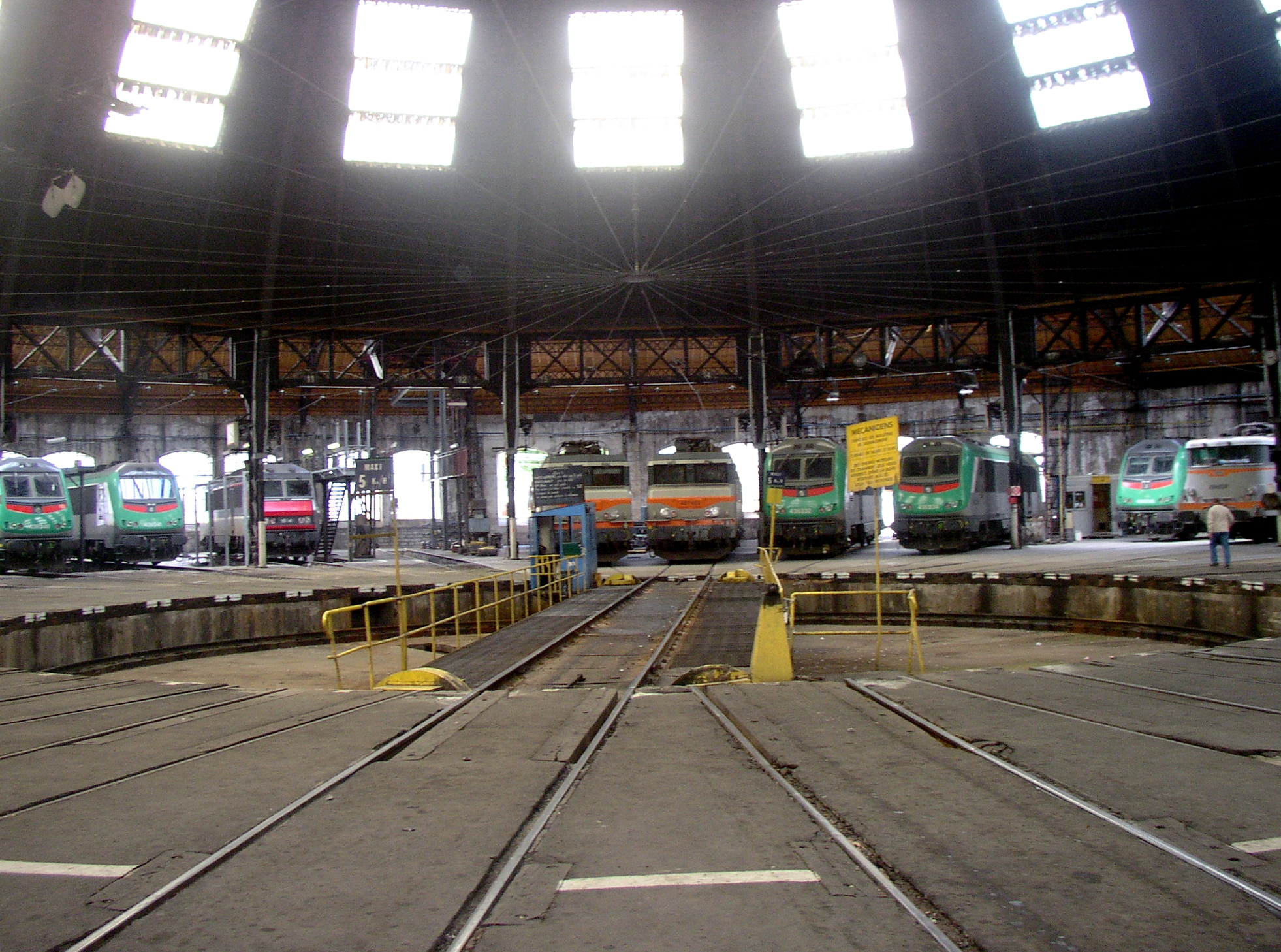 L'intérieur de la rotonde de Chambéry, où BB 36000, BB 26000, BB 25200 et BB 7200 sont garées.